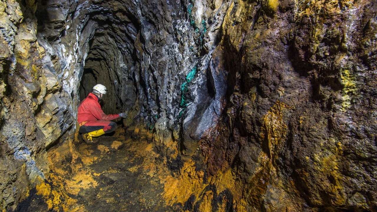 Abbaustrecke